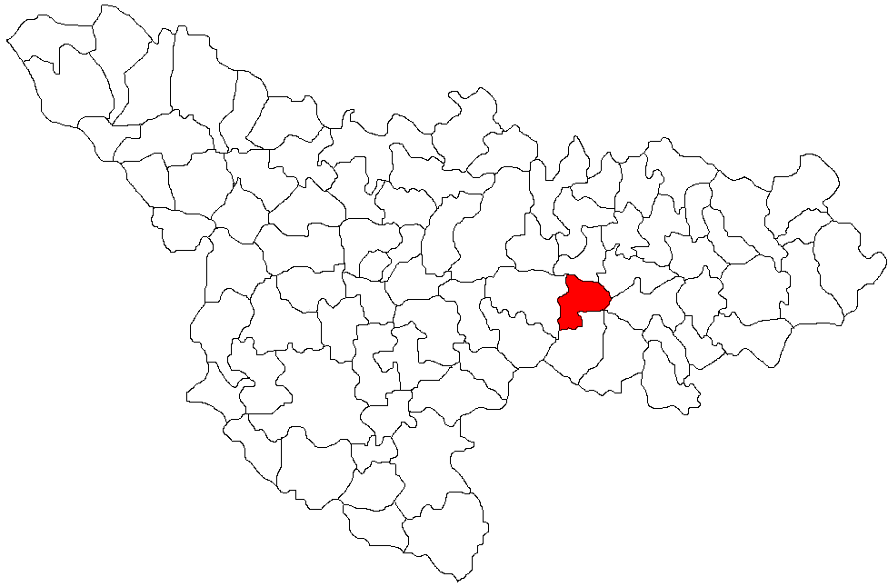 Boldur, Timis Licensing Categorie:Hărţi ale judeţului Timiş